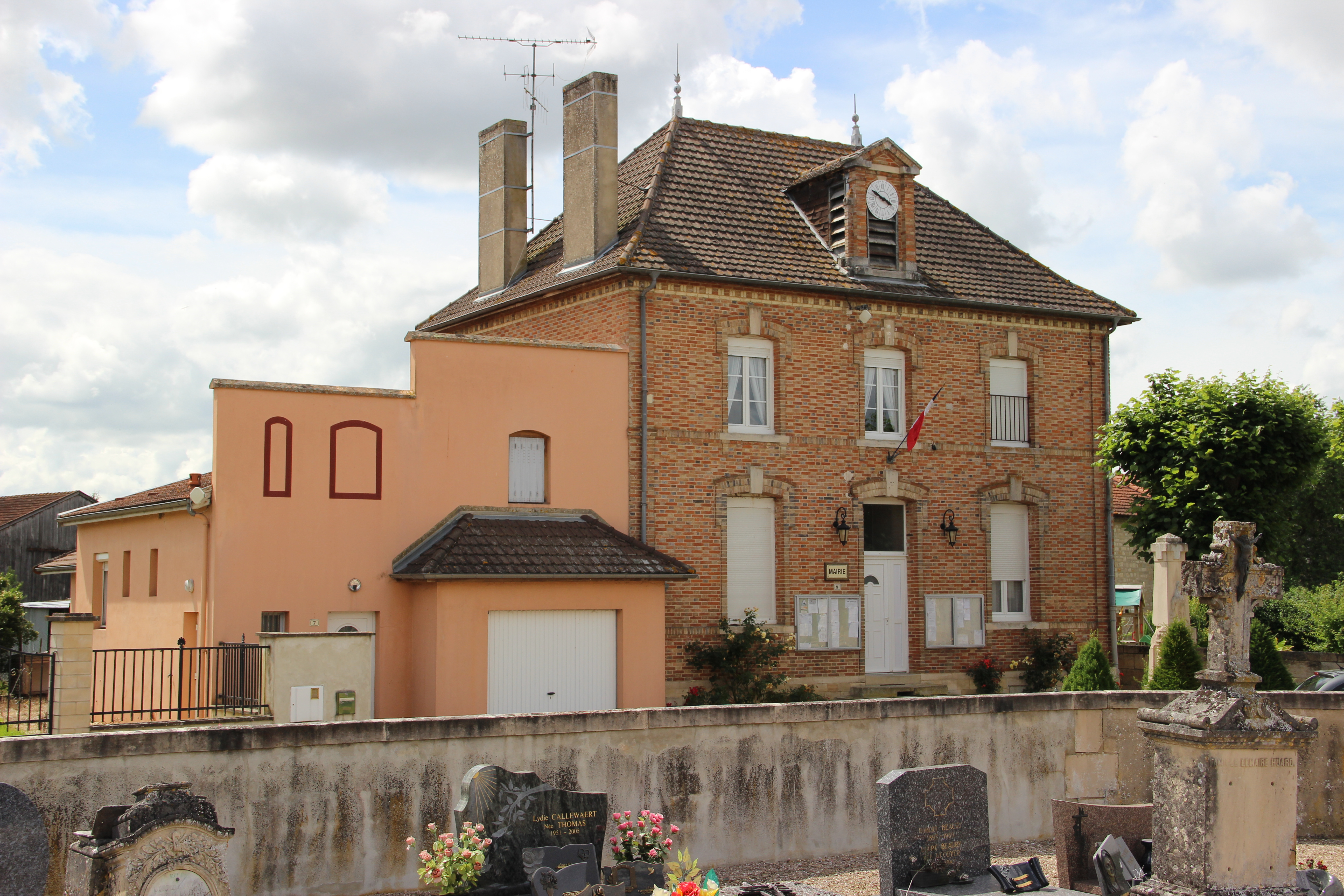 Mairie de Plichancourt